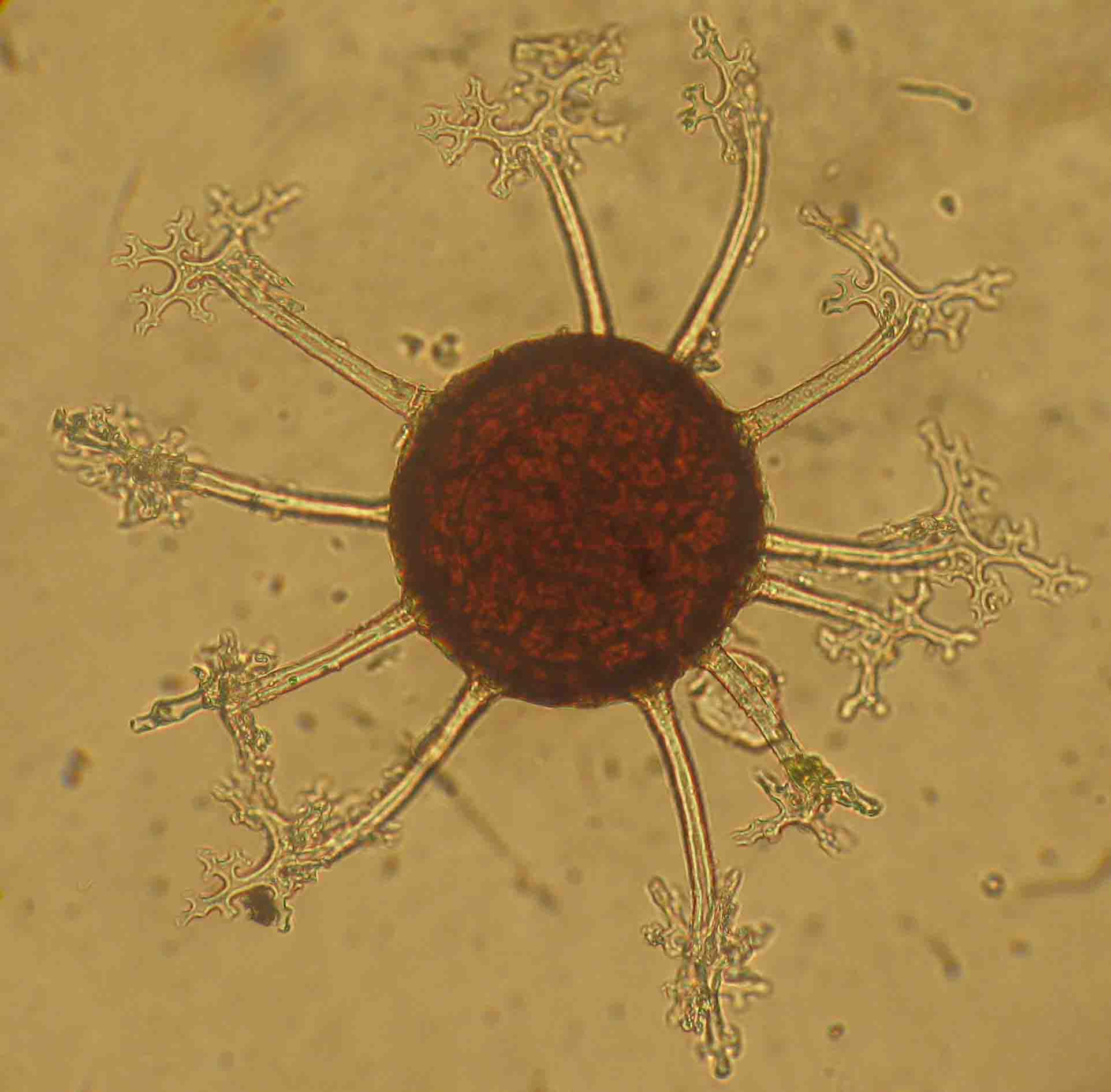 Kleistothetium des Eichen-Mehltaues Microsphaera alphitoides. Mikroskop mit 600facher Vergroesserung.